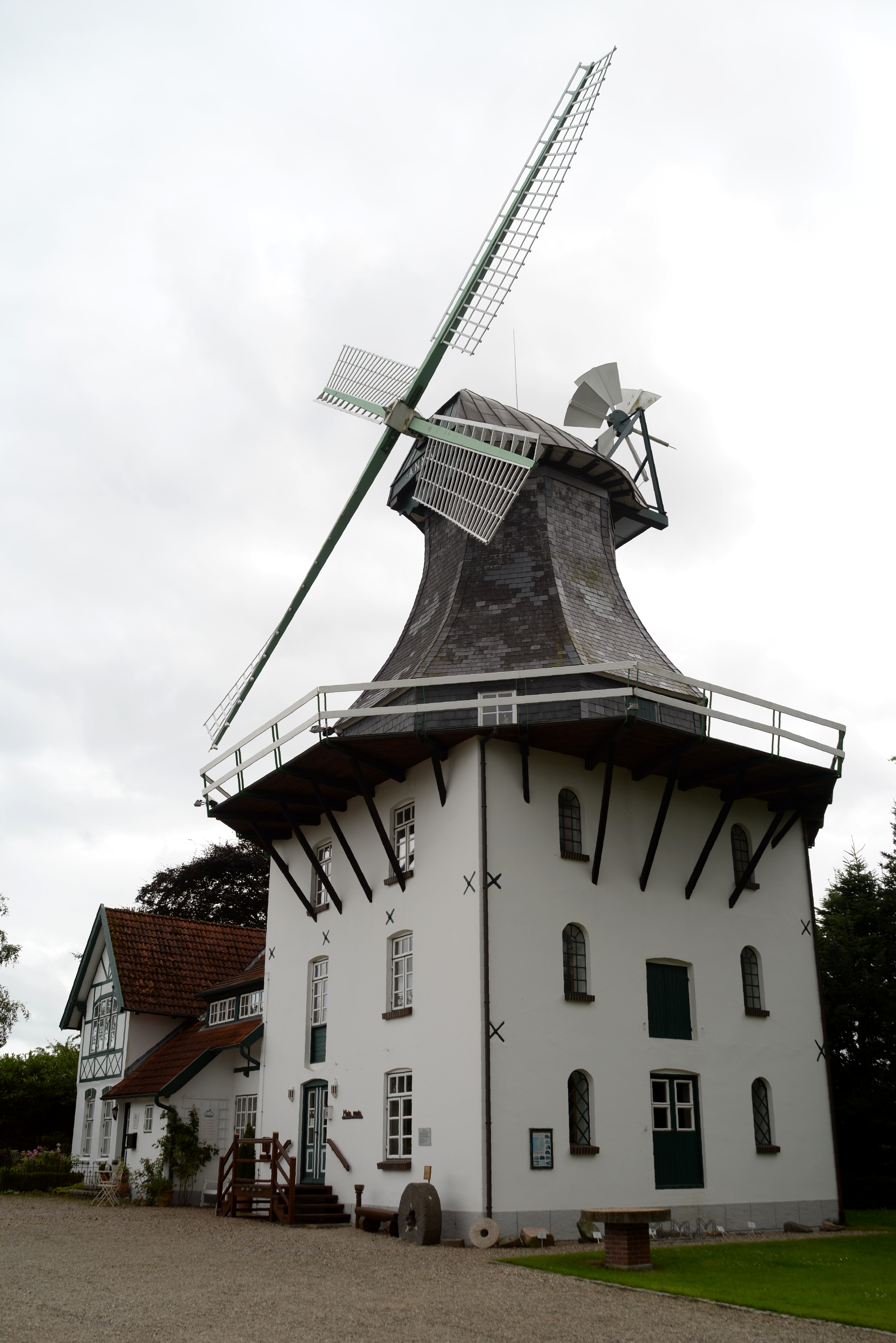 Große Windmühle (Mühle Anna) an der Schlei in Norby (Rieseby) – Eine sehr große und tolle Anlage mit Windmühle und Nebengebäuden This is a photograph of an architectural monument.It is on the list of cultural monuments of Rieseby